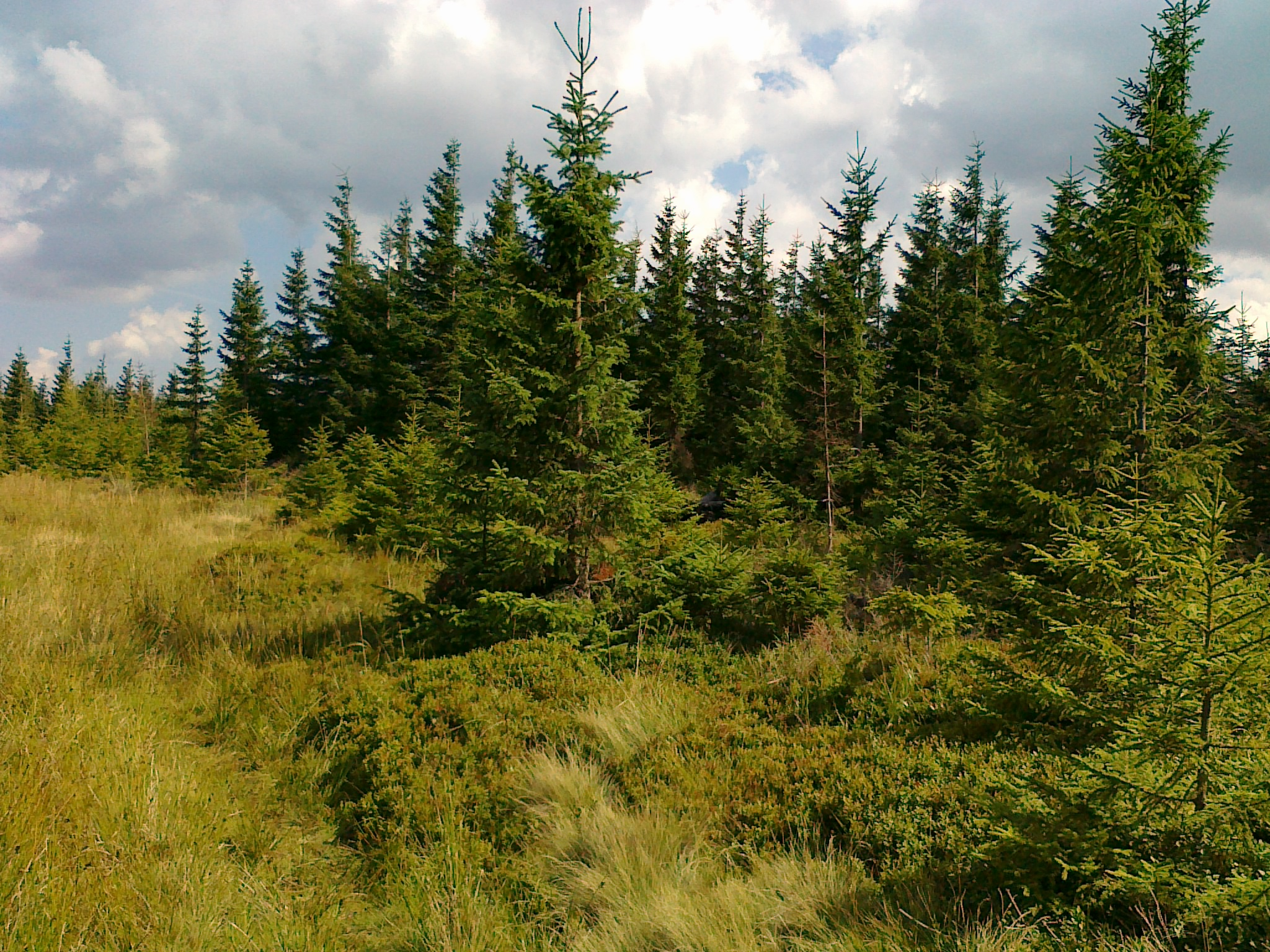 Połać szczytowa góry Kamzičí vrch